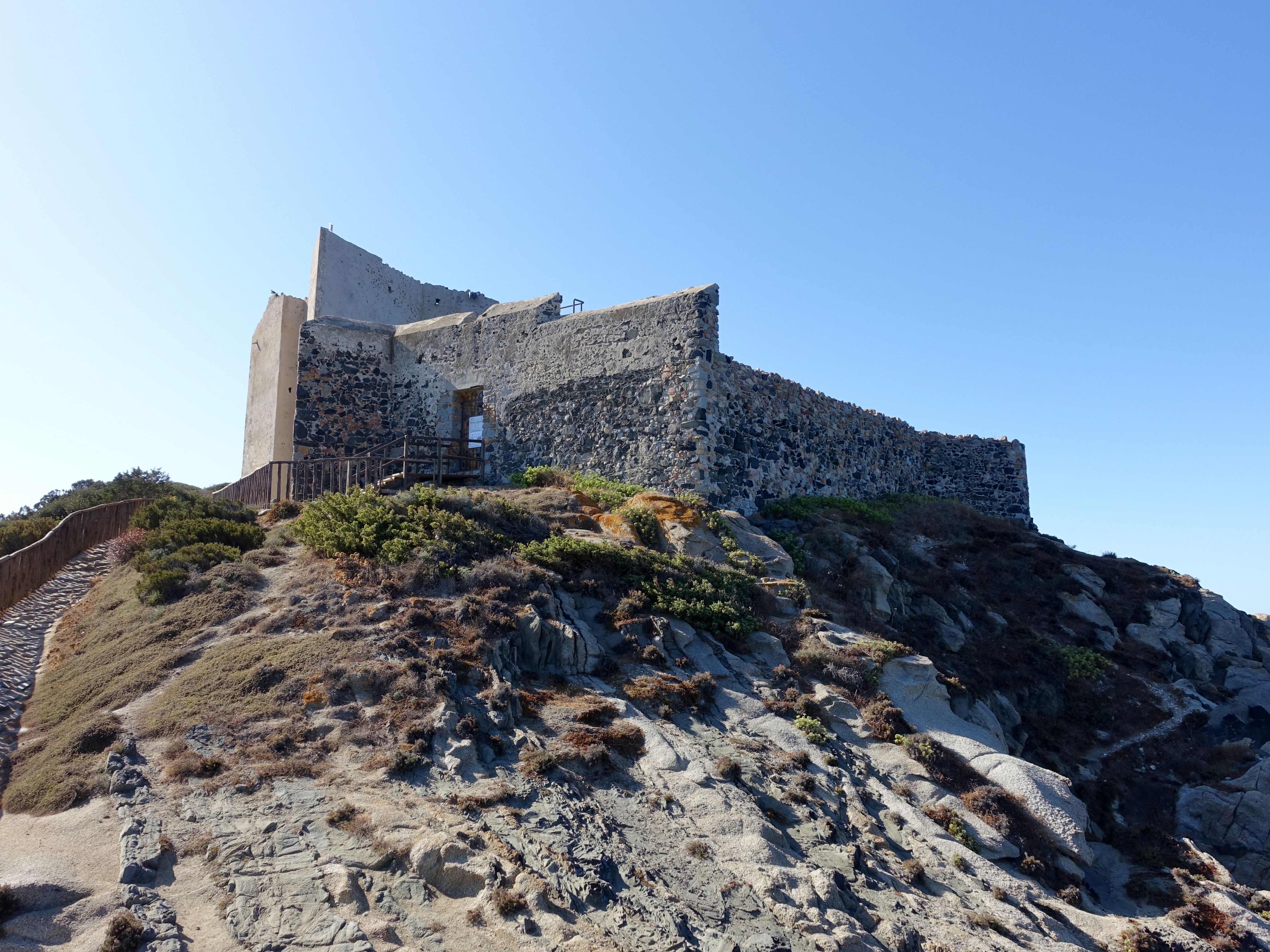 Fortezza Vecchia, Gemeinde Villasimius, Sardinien, Italien